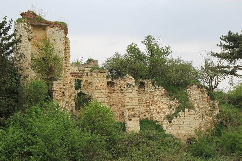 Château de Mailly-Raineval 2000